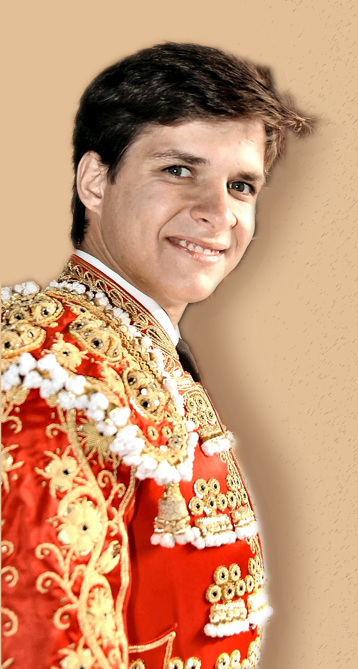 El Juli, Sortie de la Chapelle, Bayonne 5 Septembre 2004